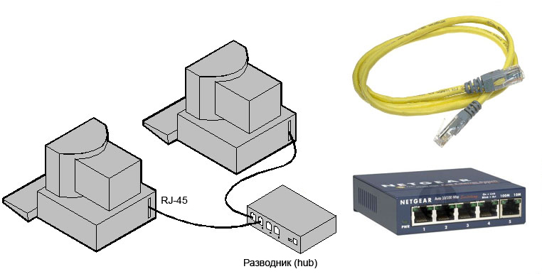 На слици је дат шематски приказ везивања станица у систем 10Base-T, затим физички изглед кабла са конекторима и разводика.